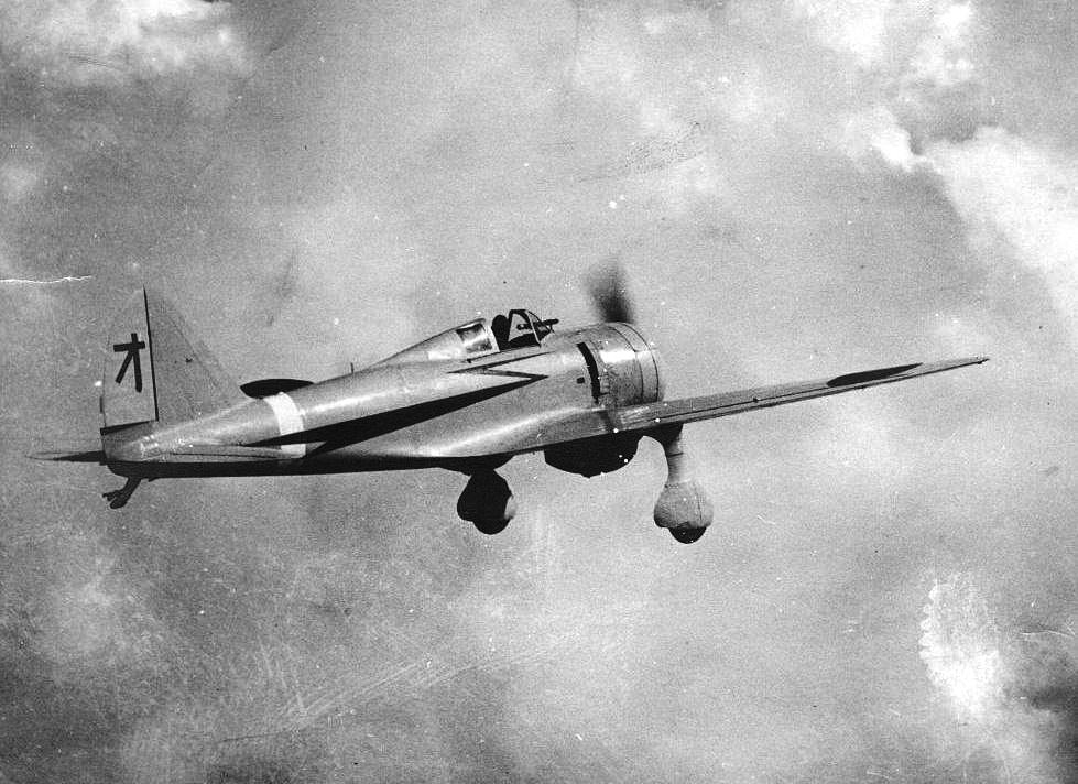 97式戦闘機